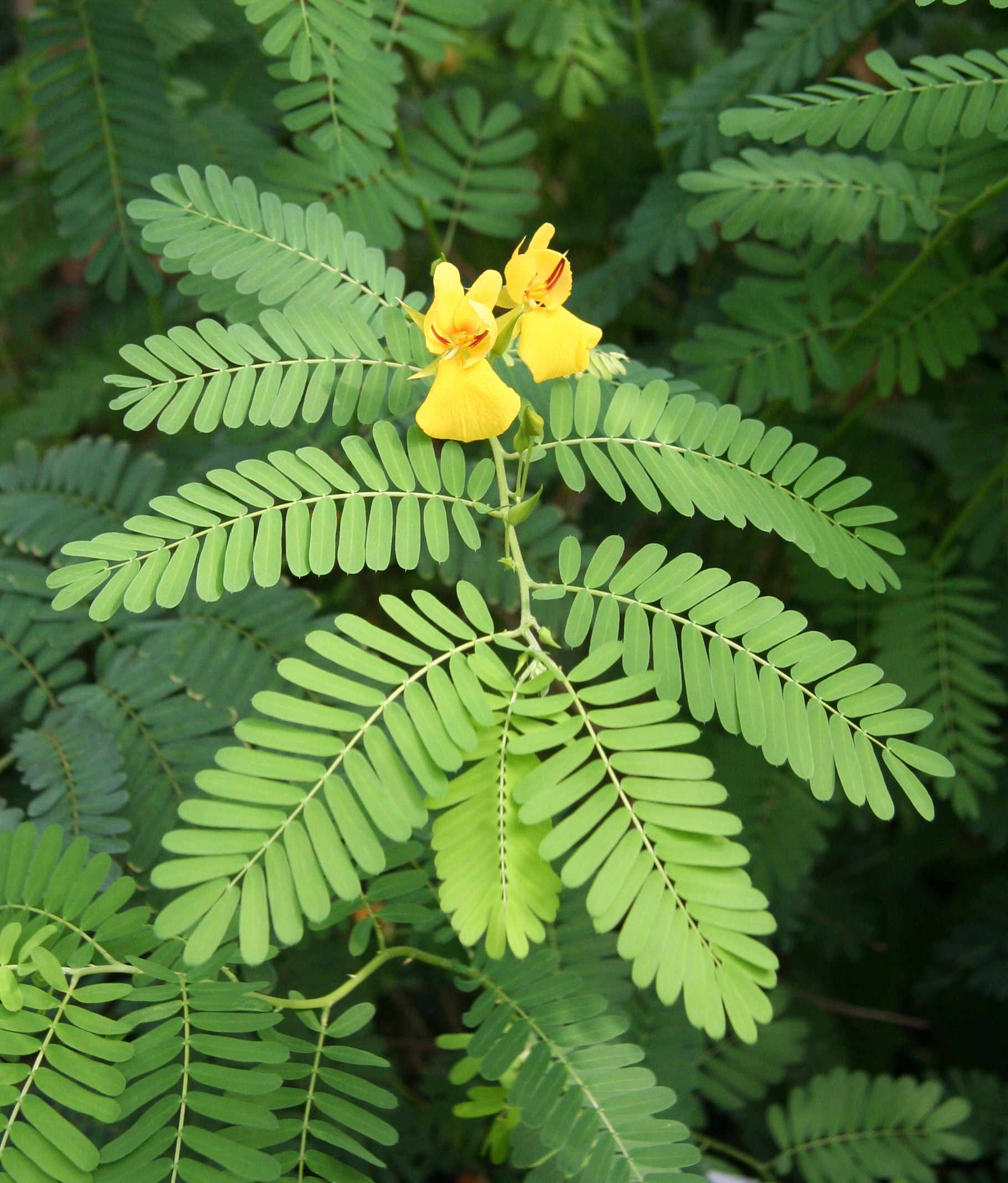 Chamaecrista glandulosa var. swartzii im Botanischen Garten Dresden